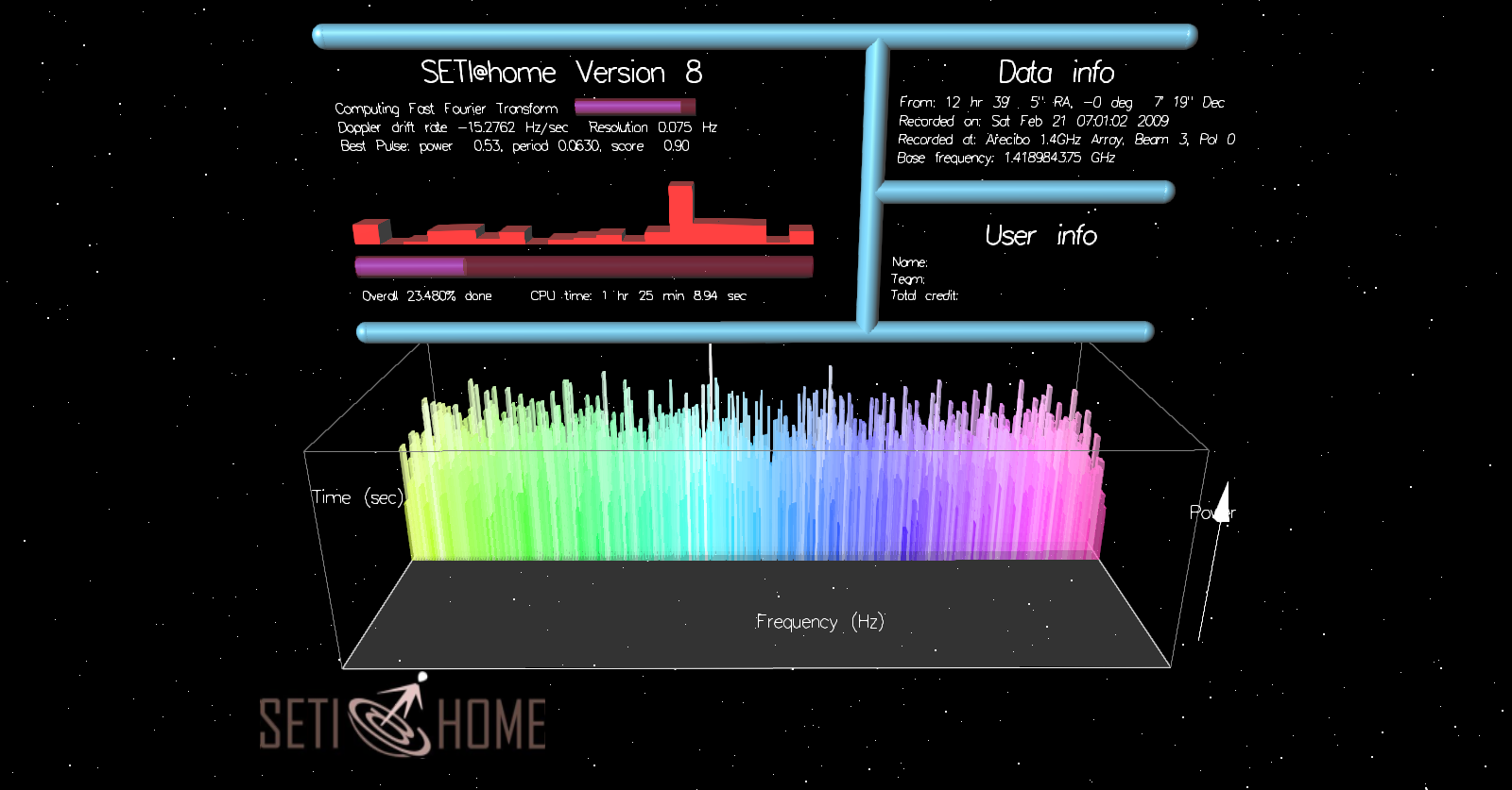 SETI@home (version 8.19) "écran de veille" ou "graphique")